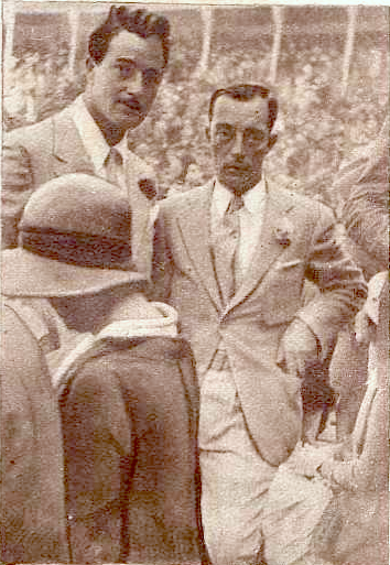 Descripción original de la revista: "Como ustedes pueden ver, este admirable "Pamplinas" sigue tan serio como siempre... ¿Quién será, en España, capaz de hacer reir á Buster Keaton?"